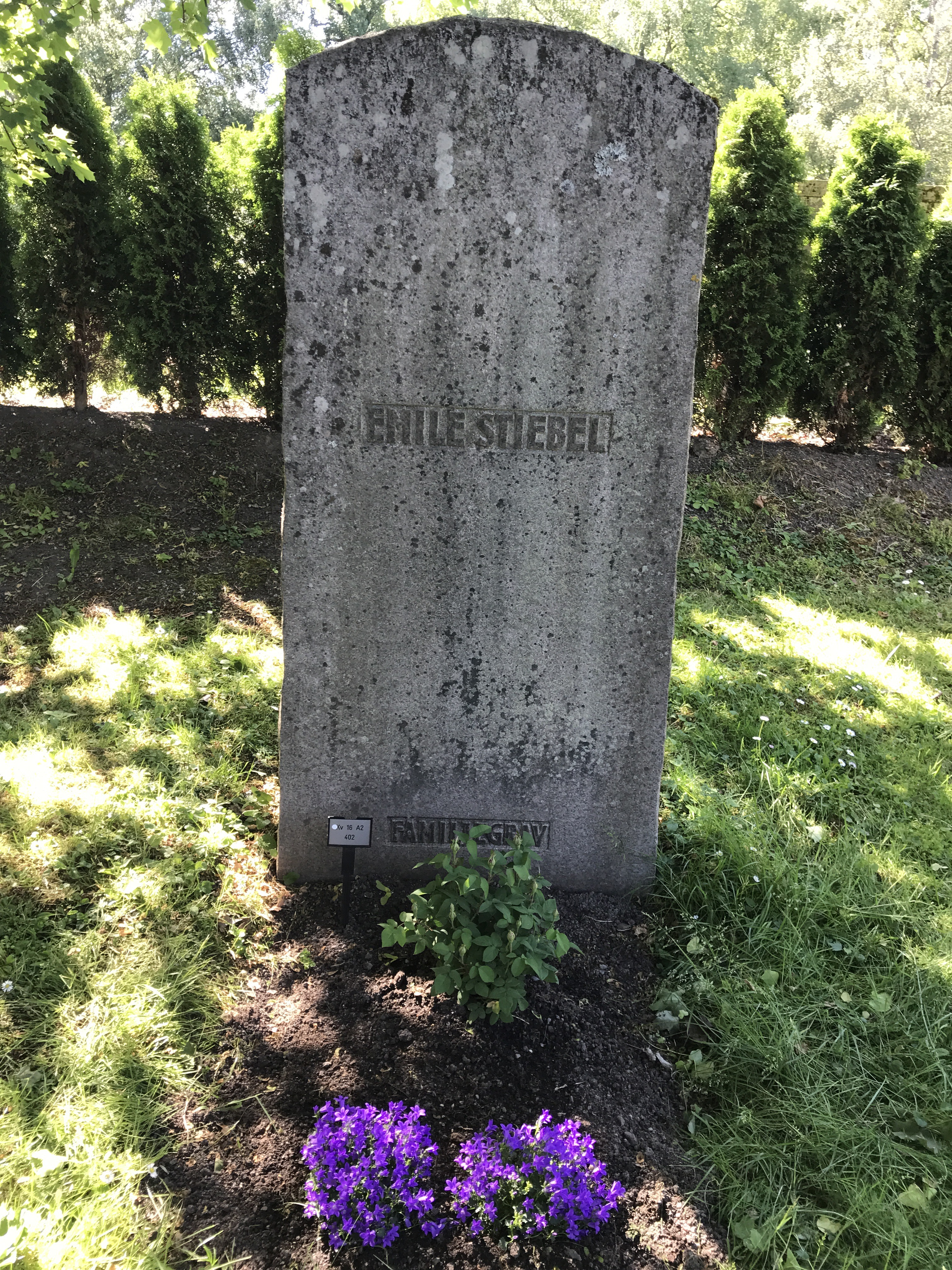 Kv 16A2 402